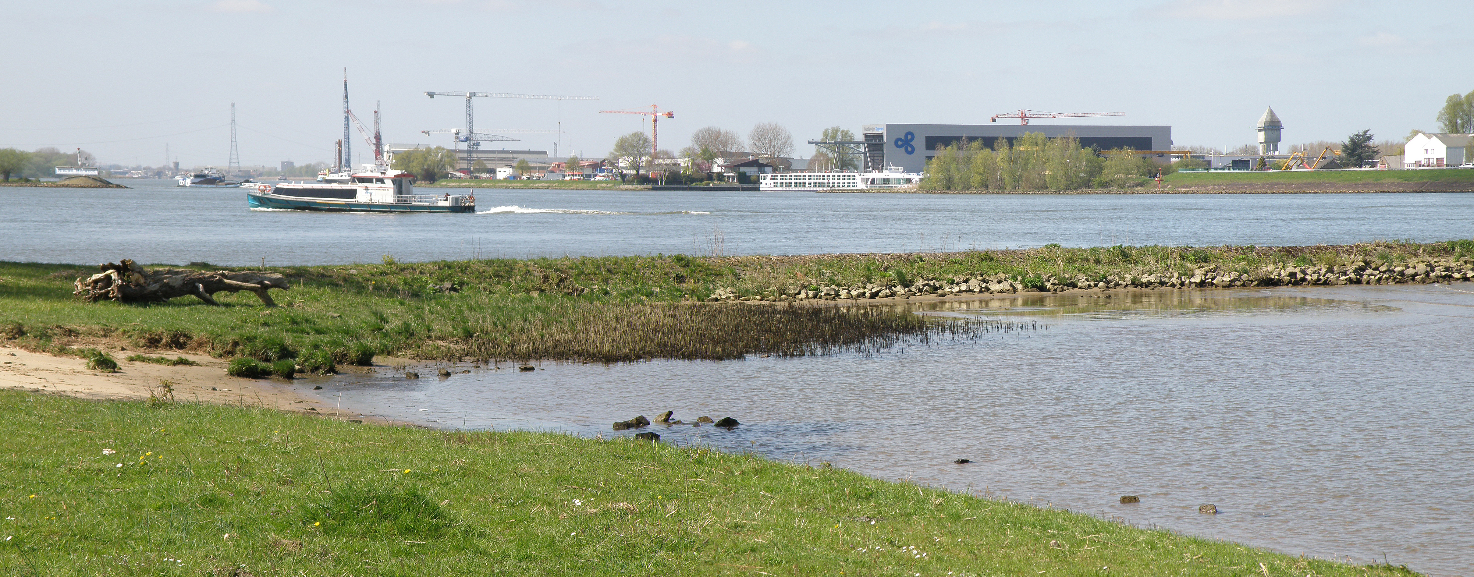 Werkendam, Nederland. De Kwellingen en Boven-Merwede.